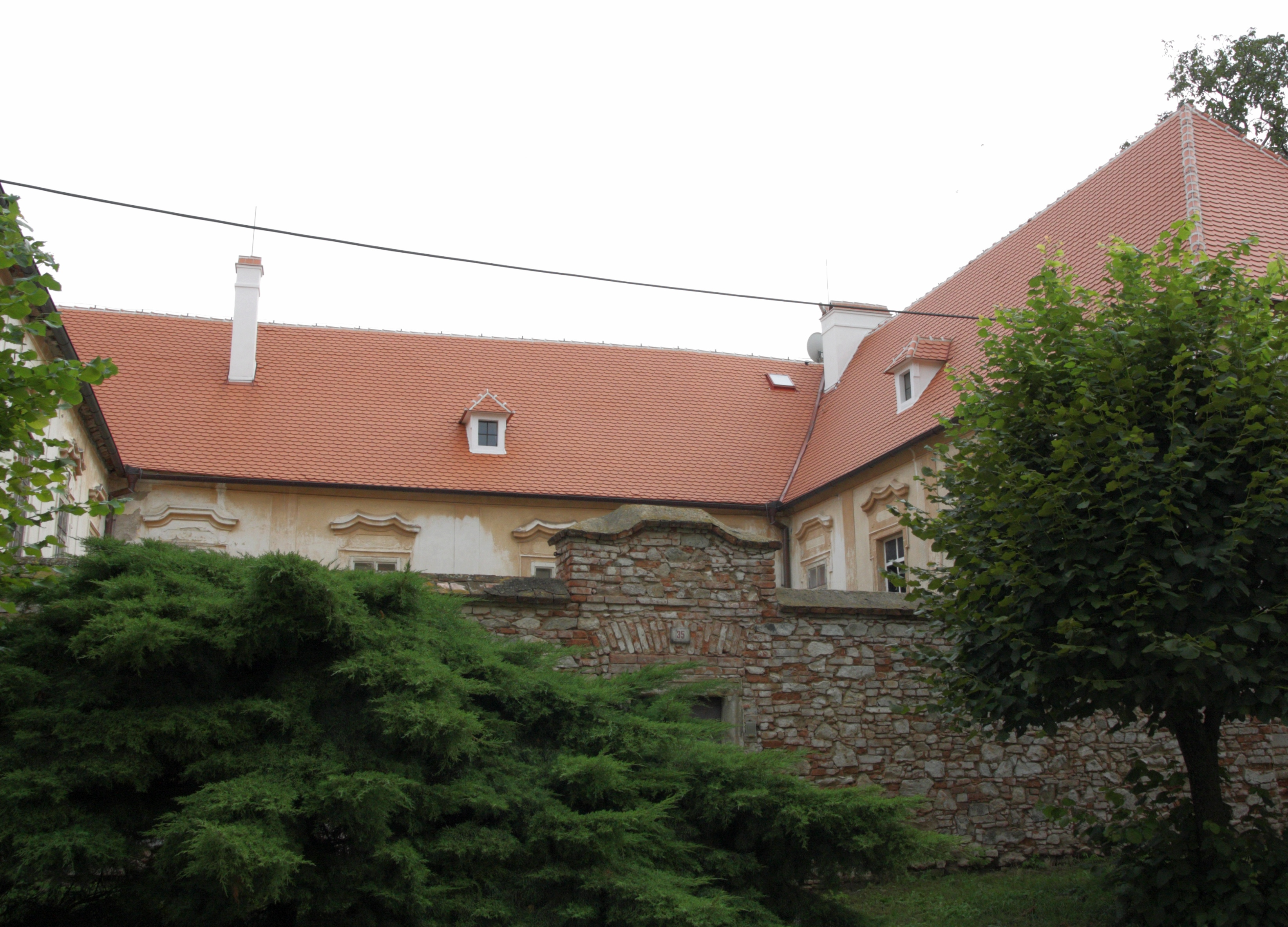 Loděnice (okres Brno-venkov) - fara, pohled od kostela.